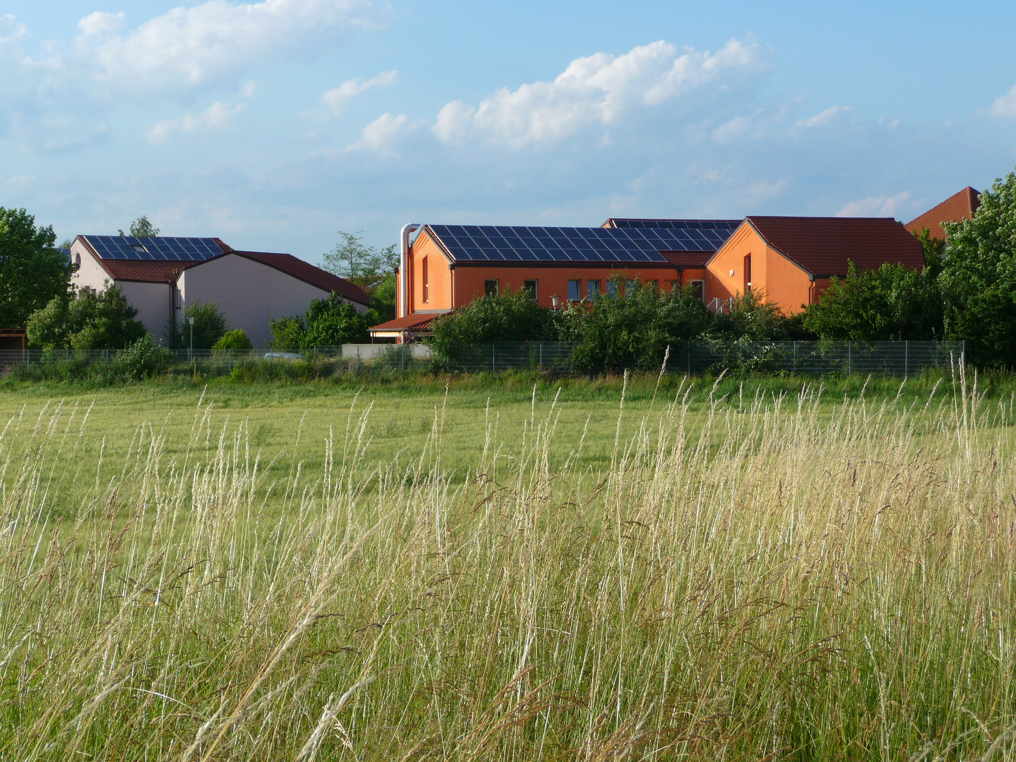 Blick auf die Freie Waldorfschule in Heidelberg-Wieblingen